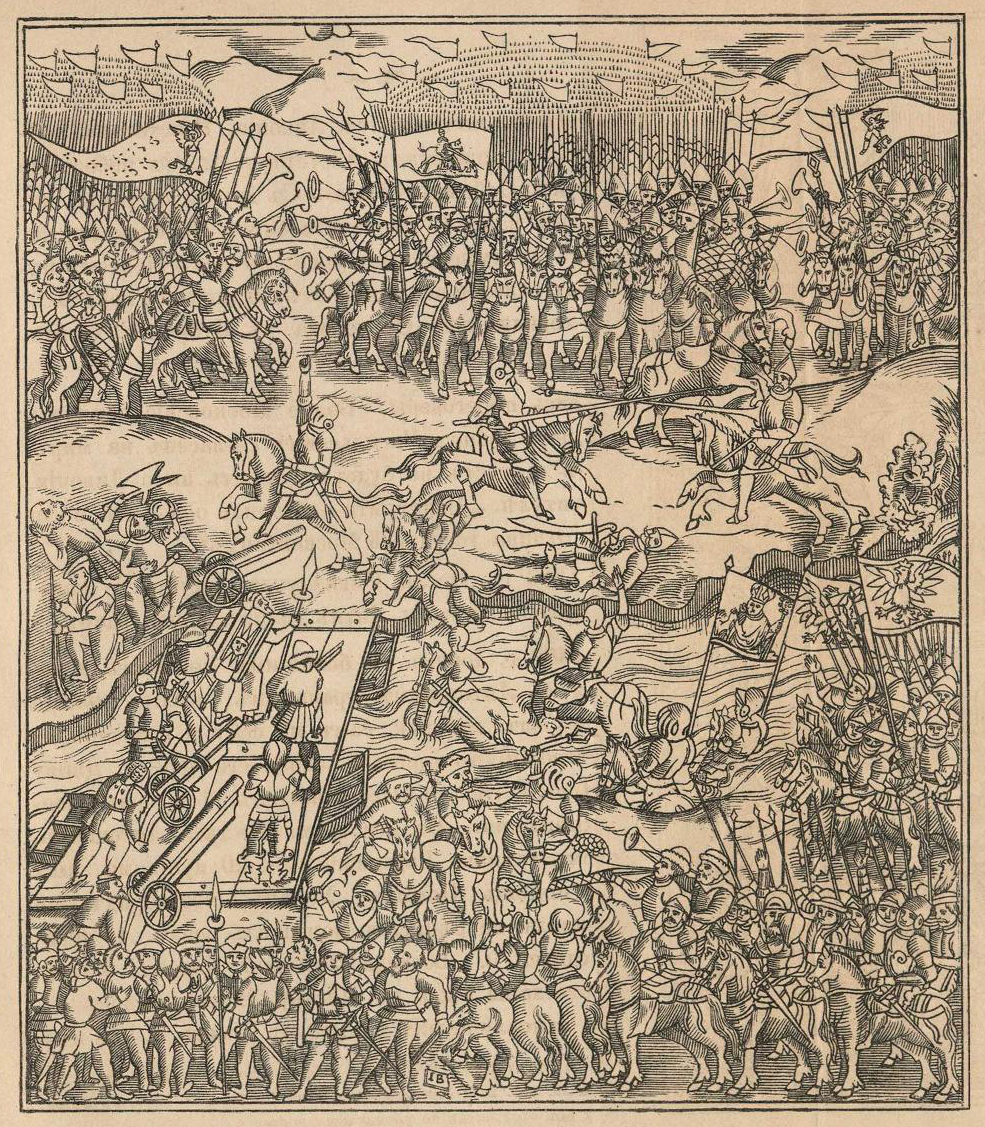 Беларуская (тарашкевіца): Невель (Nieviel). Невельская бітва 1563 году